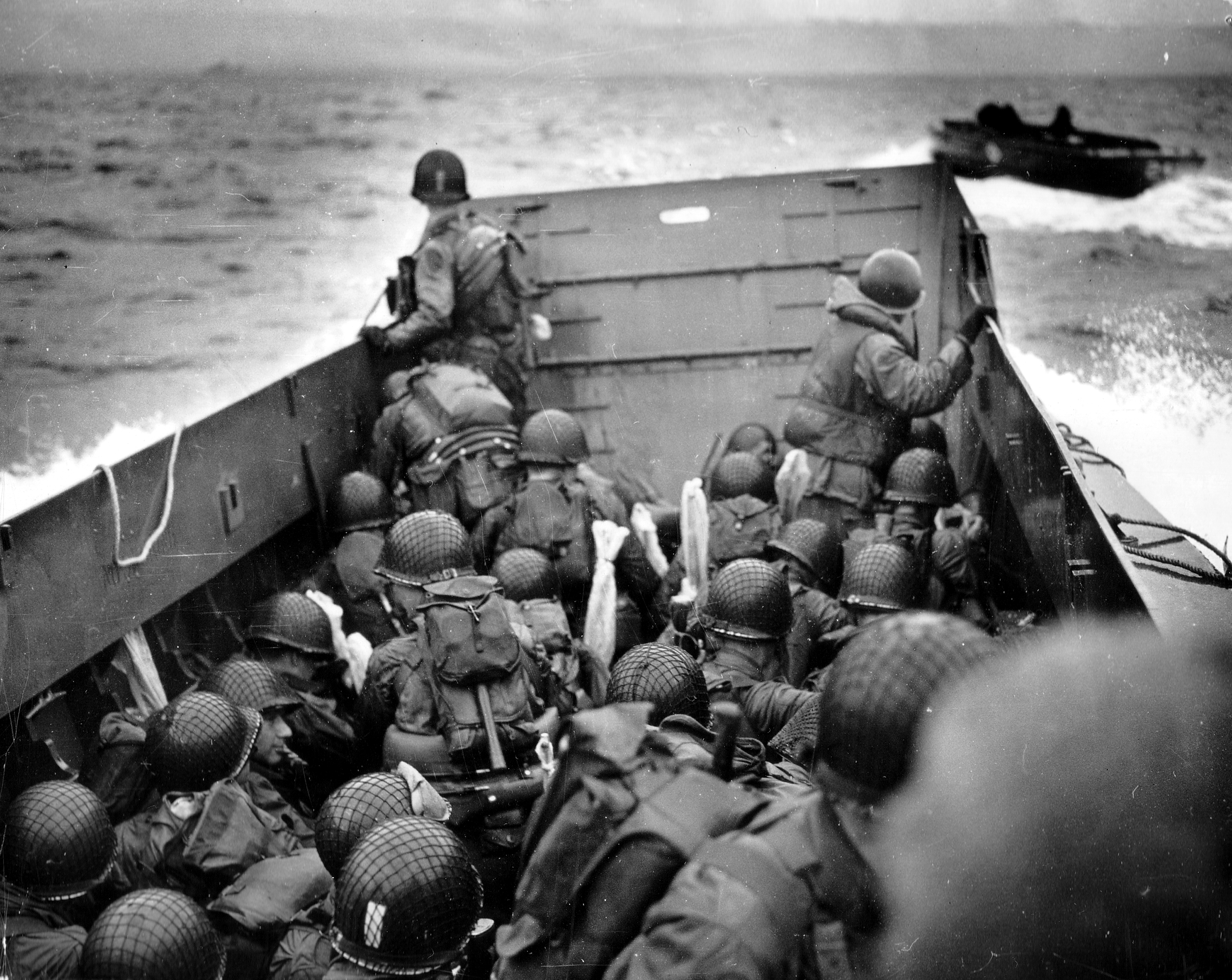 US Navy : débarquement américain en Normandie : A bord d'une barge, face à Omaha. Le ciel est plombé, la mer est grosse. Chacun a protégé son arme d'un étui plastique prévu à cet effet par l'intendance. Un USN et un officier observent le trajet qui les rapproche de la plage.